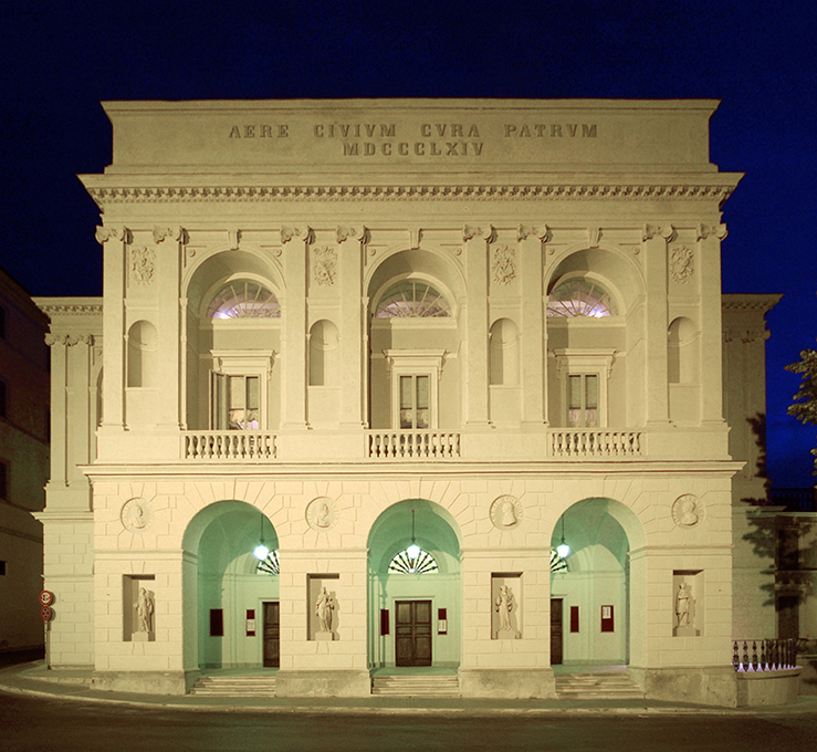 Teatro Nuovo di Spoleto, esterno frontale con illuminazione artificiale